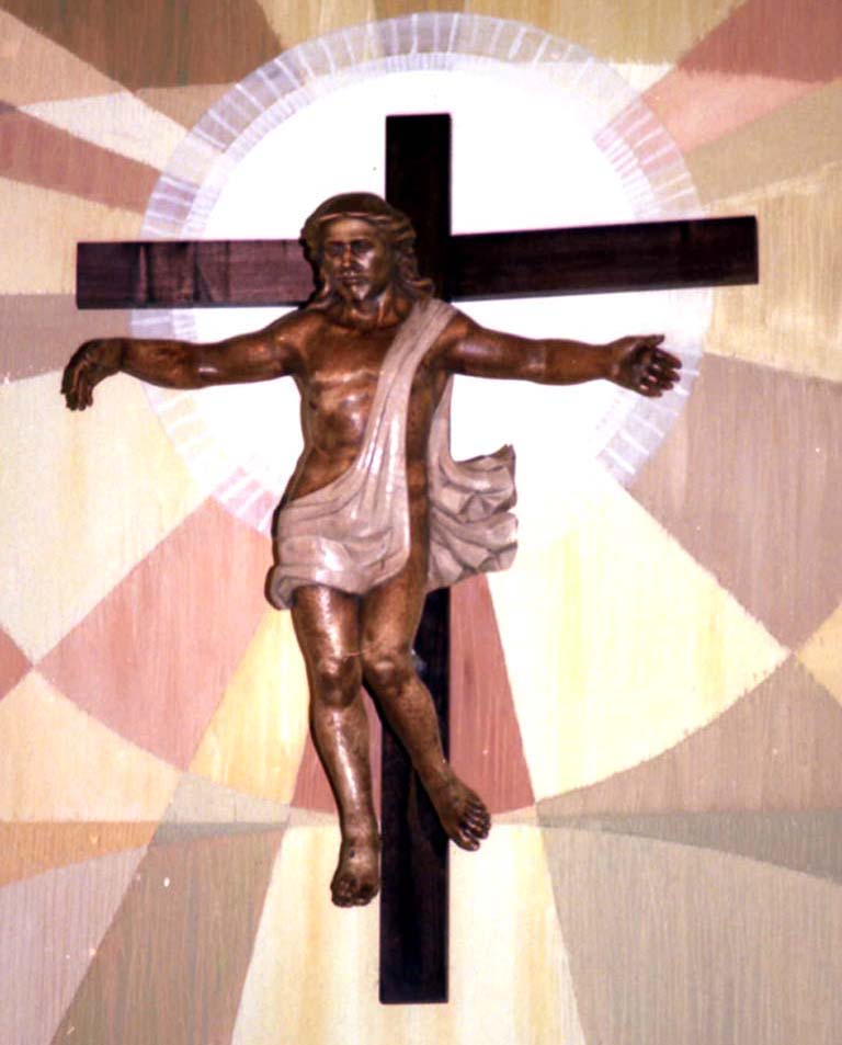 Medina Ayllón Cristo resucitado de la iglesia de san Paciano de Sant Andreu de Palomar (Barcelona). Talla en madera de Medina Ayllón. 1985.